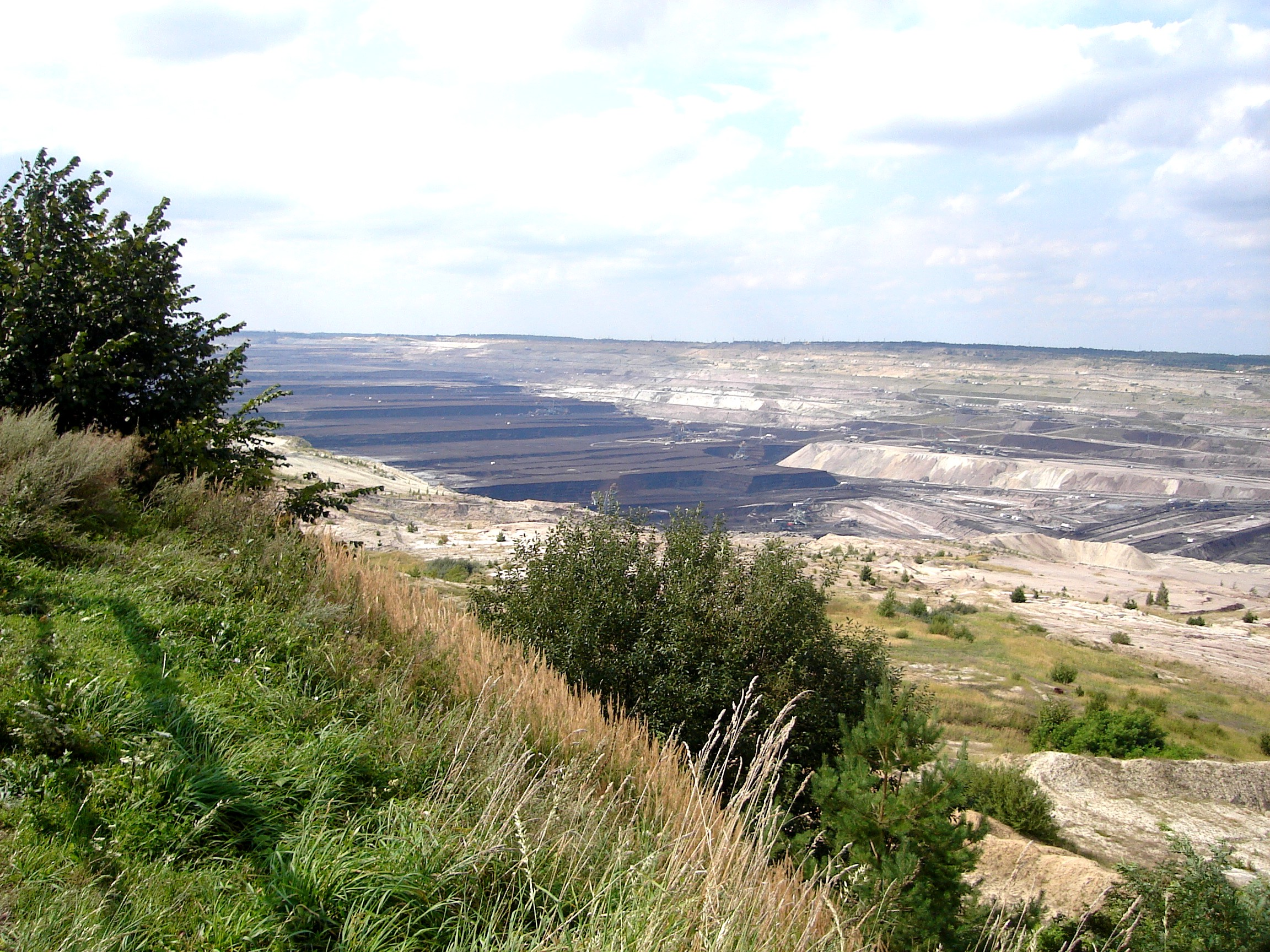 Bełchatów